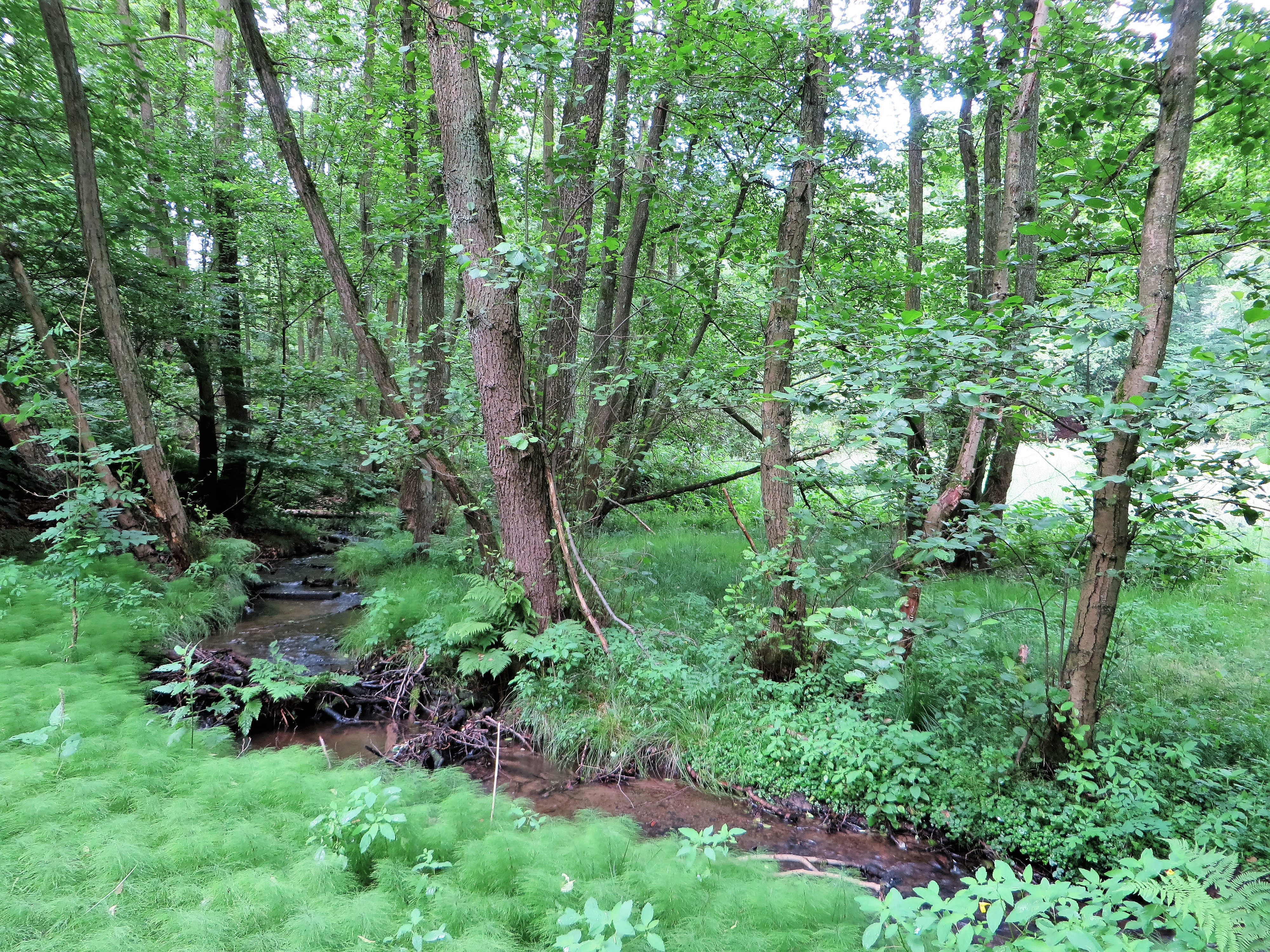 Naturschutzgebiet Funckenhauser Bachtal (NSG HA-011) in Hagen-Vohalle, zwischen Funckenhausen und Tücking. Das kleine Wald- und Feuchtgebiet durchfließt der am Tücking entspringende Mühlenbrinkbach. Im Unterlauf hat sich der Bach, begleitet von einem Erlensaum, tief in eine Grünlandbrache eingegraben, z.T. mit Wald-Schachtelhalm bedeckt (Foto unten links). Weiter oberhalb befindet sich ein wertvoller Eschen-Erlen-Bestand. Im Trockenbereich des Waldes stehen Buchen, Eichen und 200 Jahre alte Rotbuchen.